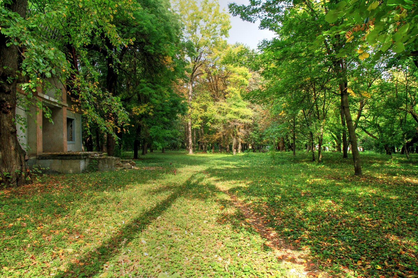 Темелеуцкий парк, монумент природы, находится в Приднестровия, Каменский район, с. Темелеуць (код MD-CC-map-005)